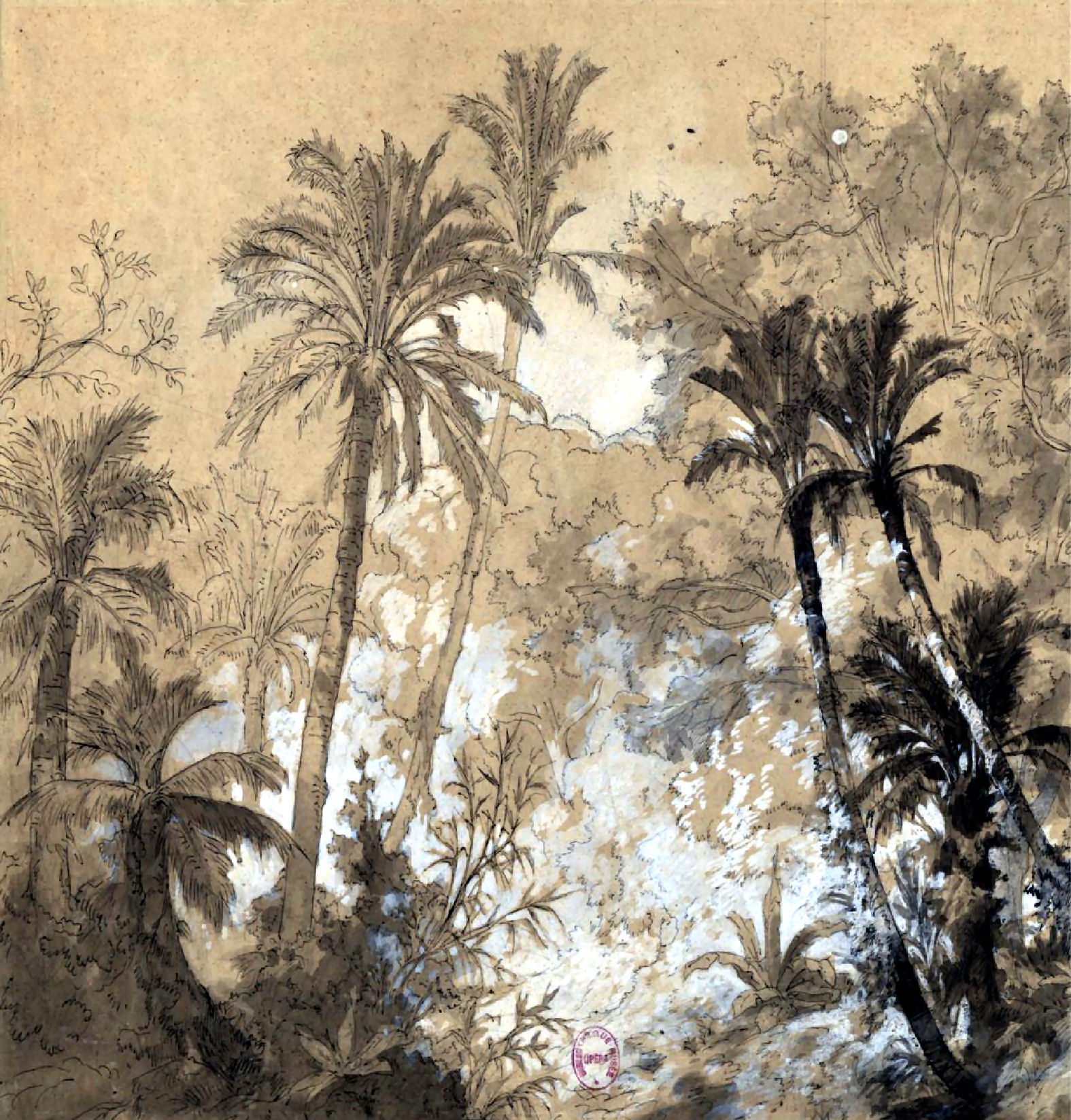 Esquisse de décor du premier tableau de l'acte V de L'Africaine de Meyerbeer par Édouard Despléchin